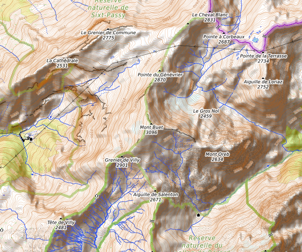 carte réalisée sur umap This map may be incomplete, and may contain errors. Don't rely solely on it for navigation.